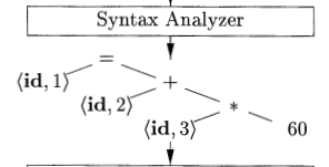 դֆ